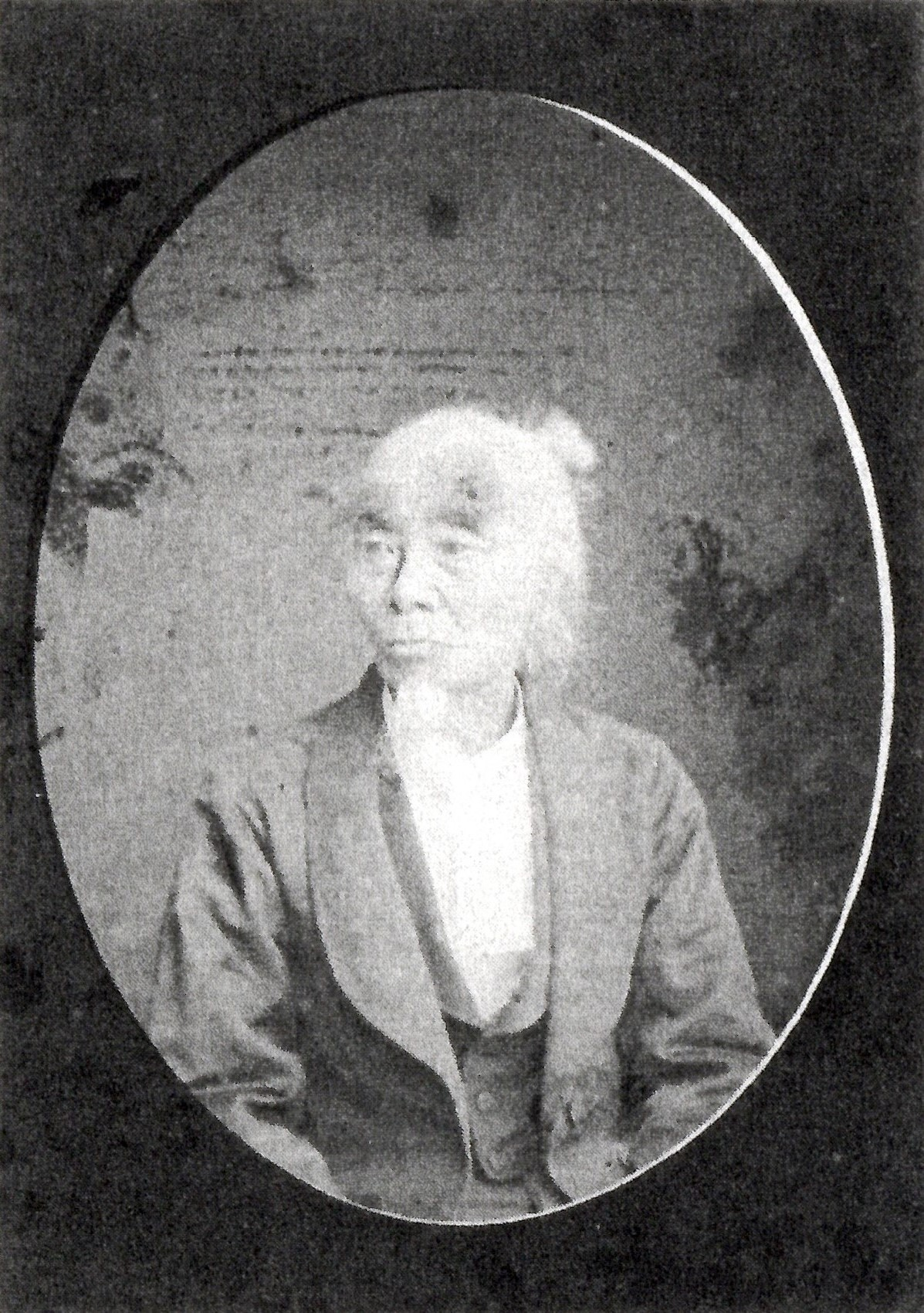 九鬼隆都の肖像写真。